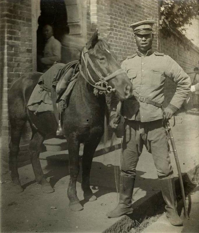 辛亥革命頃の騎兵。